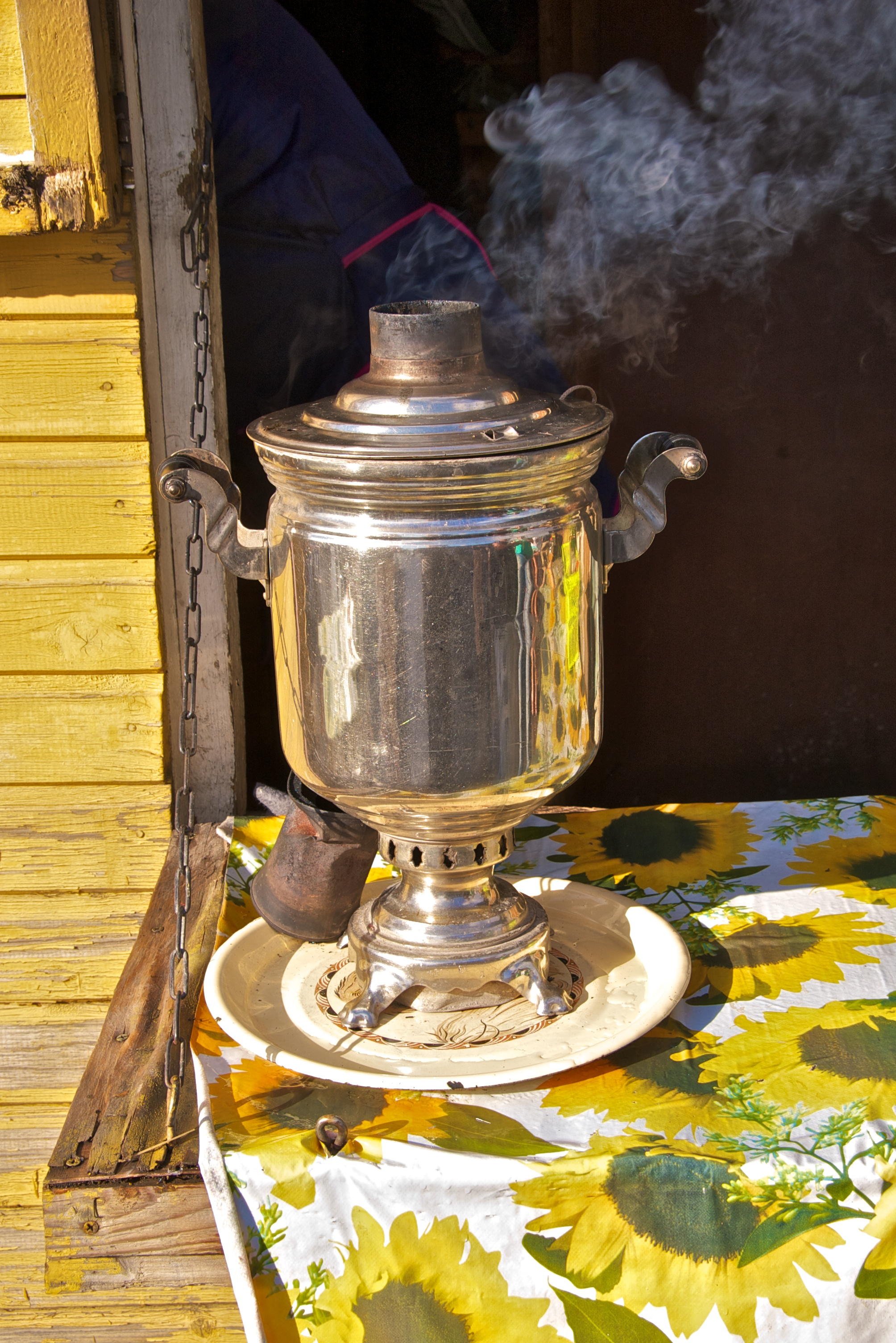 Russische samowar.